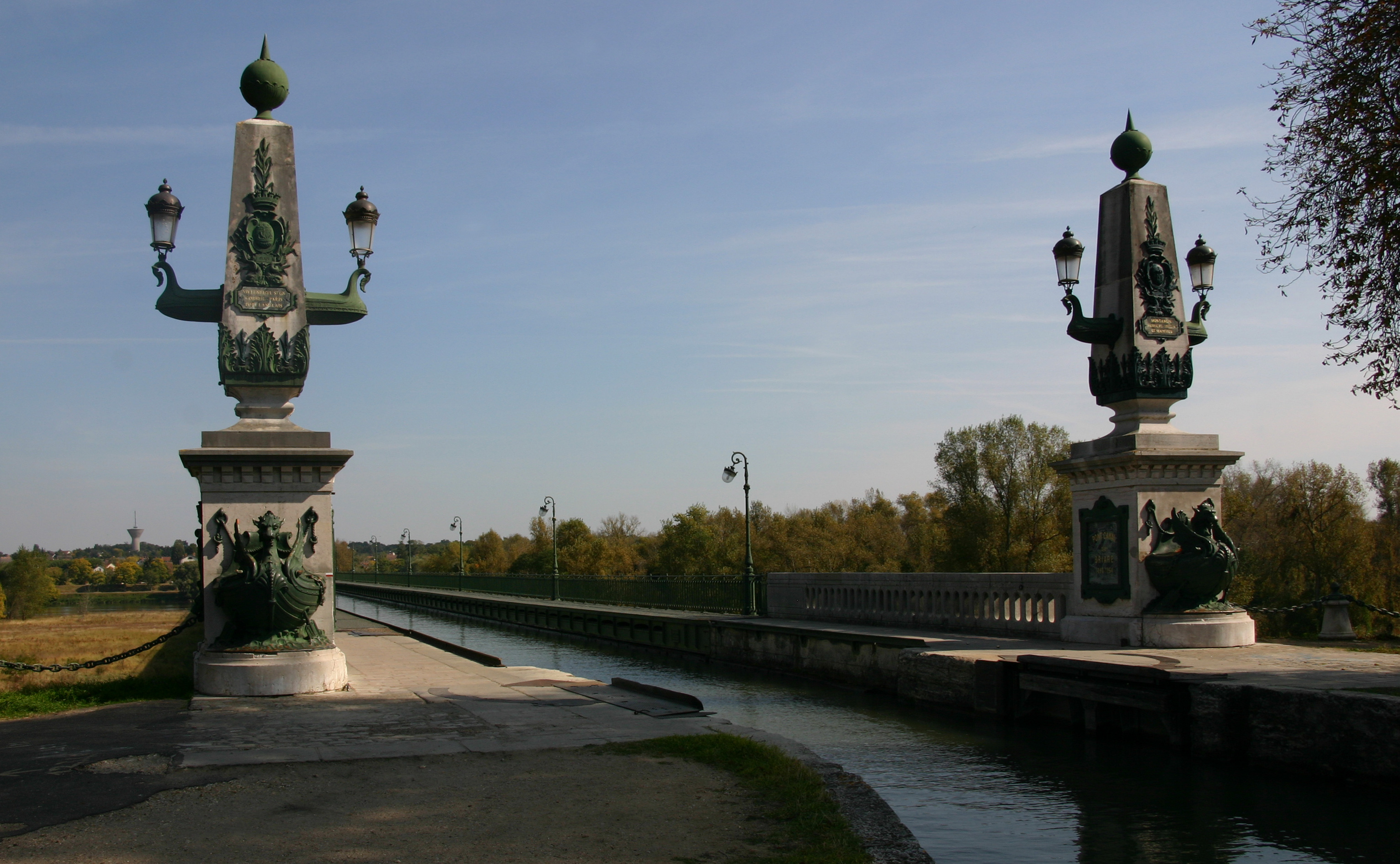 Kanalbrücke Briare; auf ihr quert der Canal latéral à la Loire den tiefer gelegenen Fluss Loire.